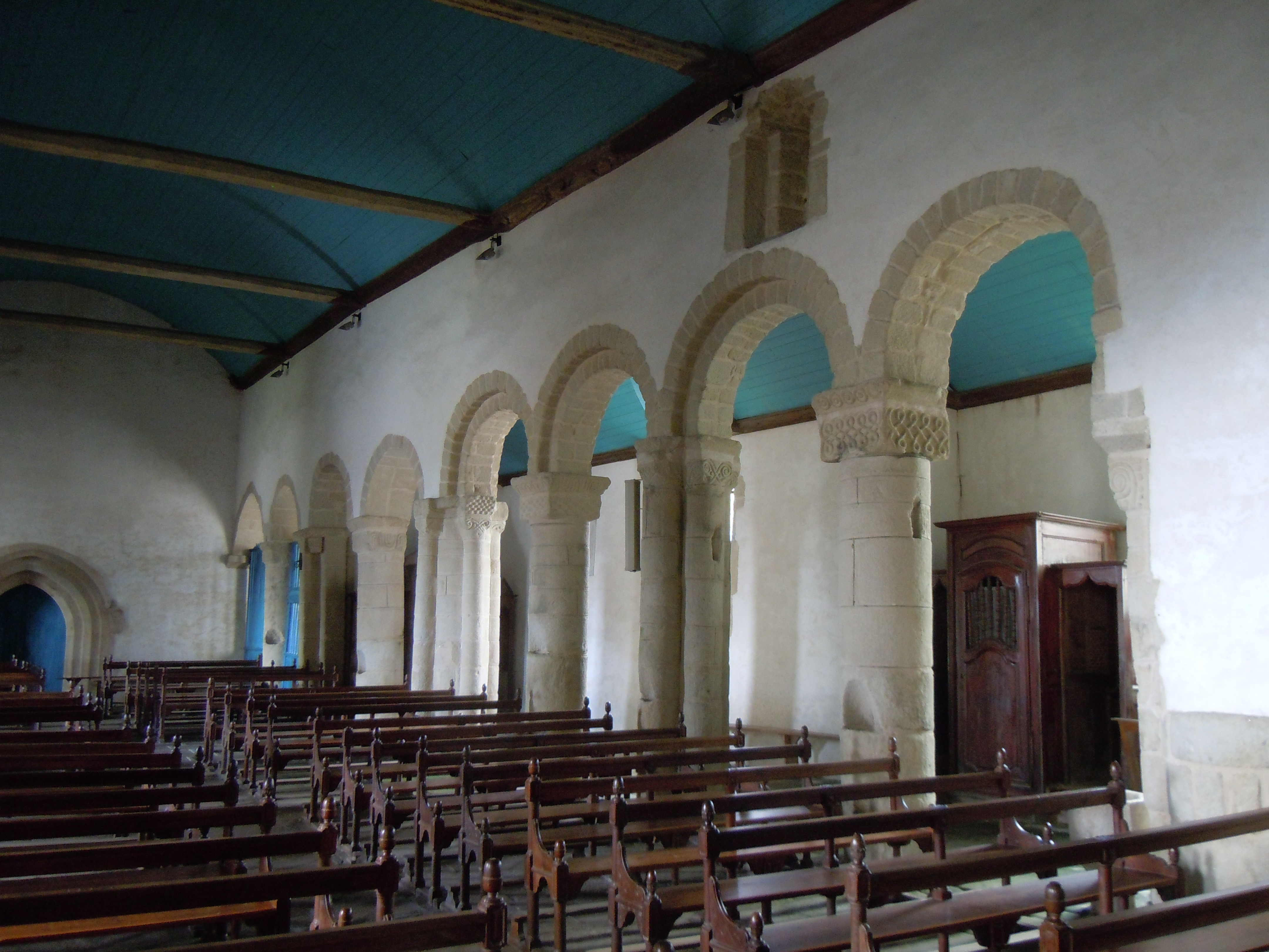 vue de la nef et de huit arcades à plein cintre que supportent des piles coiffées de chapiteaux, église Saint-Pierre, commune de Ploërdut, département du Morbihan, France